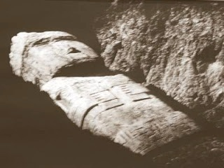 Monolito Bennet o Estela Pachamama. Primera fotografía, el día de su descubrimiento, junio de 1932